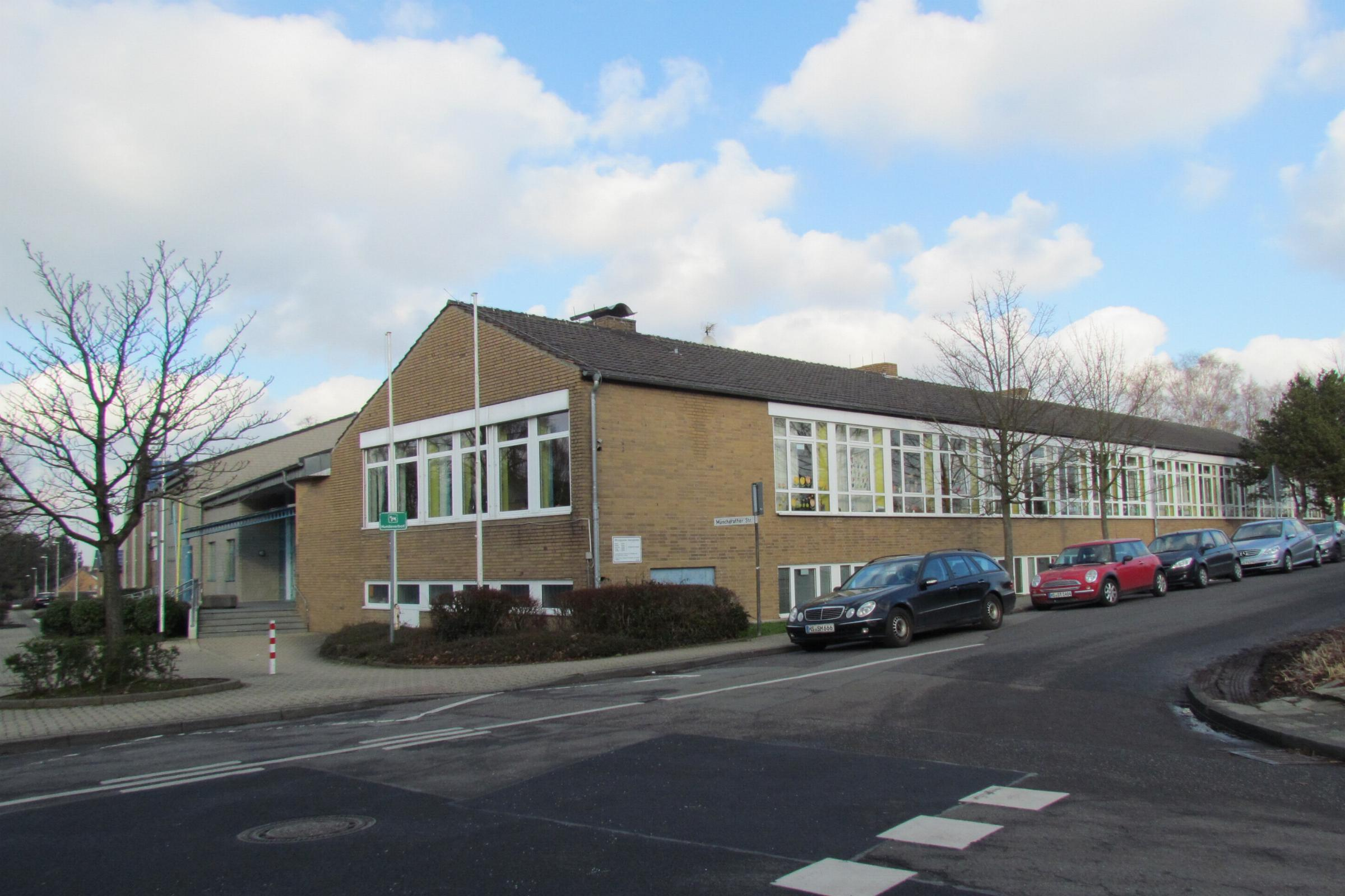 Kath. Grundschule in Teveren